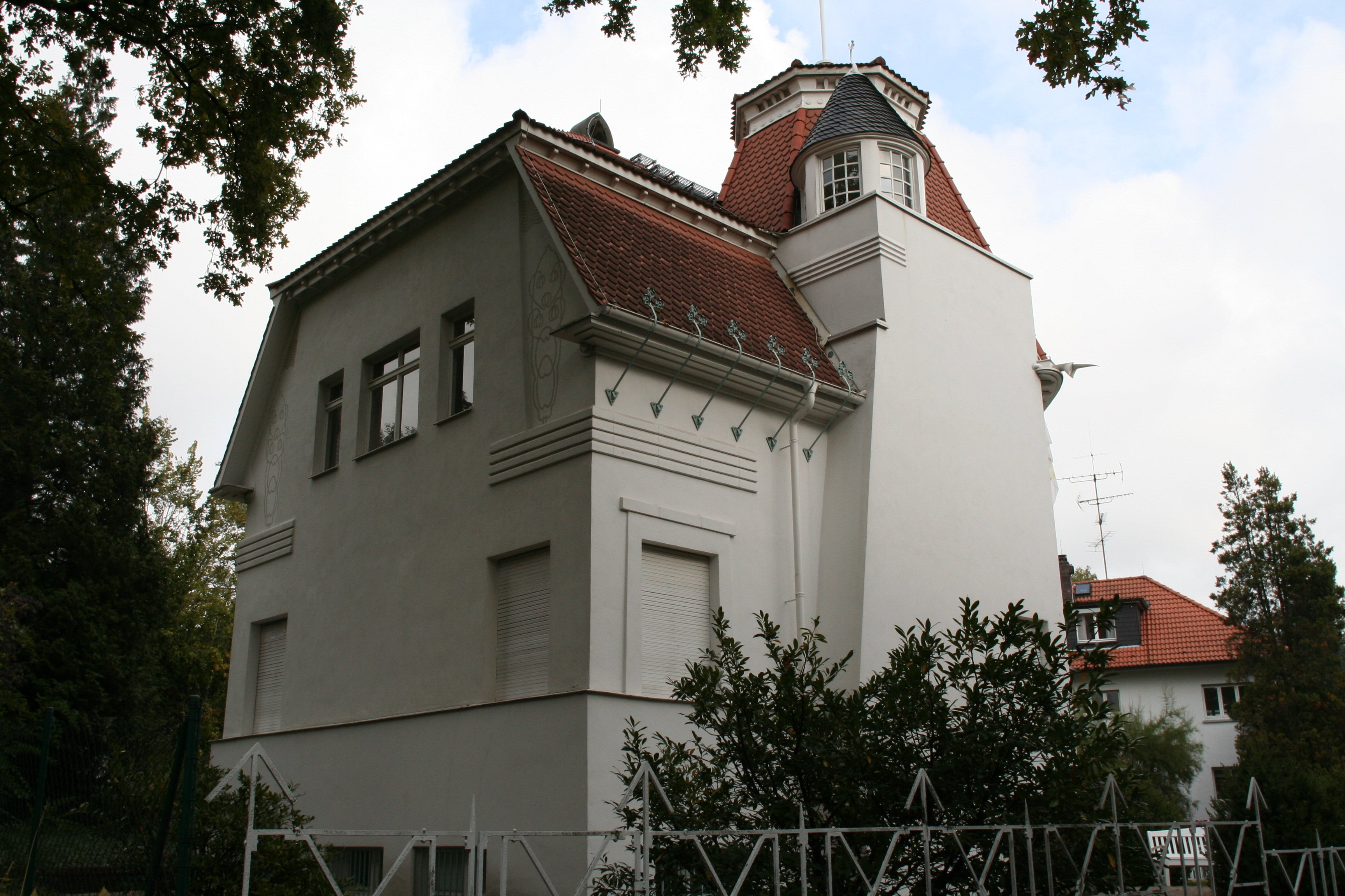 Haus Deiters auf der Mathildenhöhe, Darmstadt (Germany)